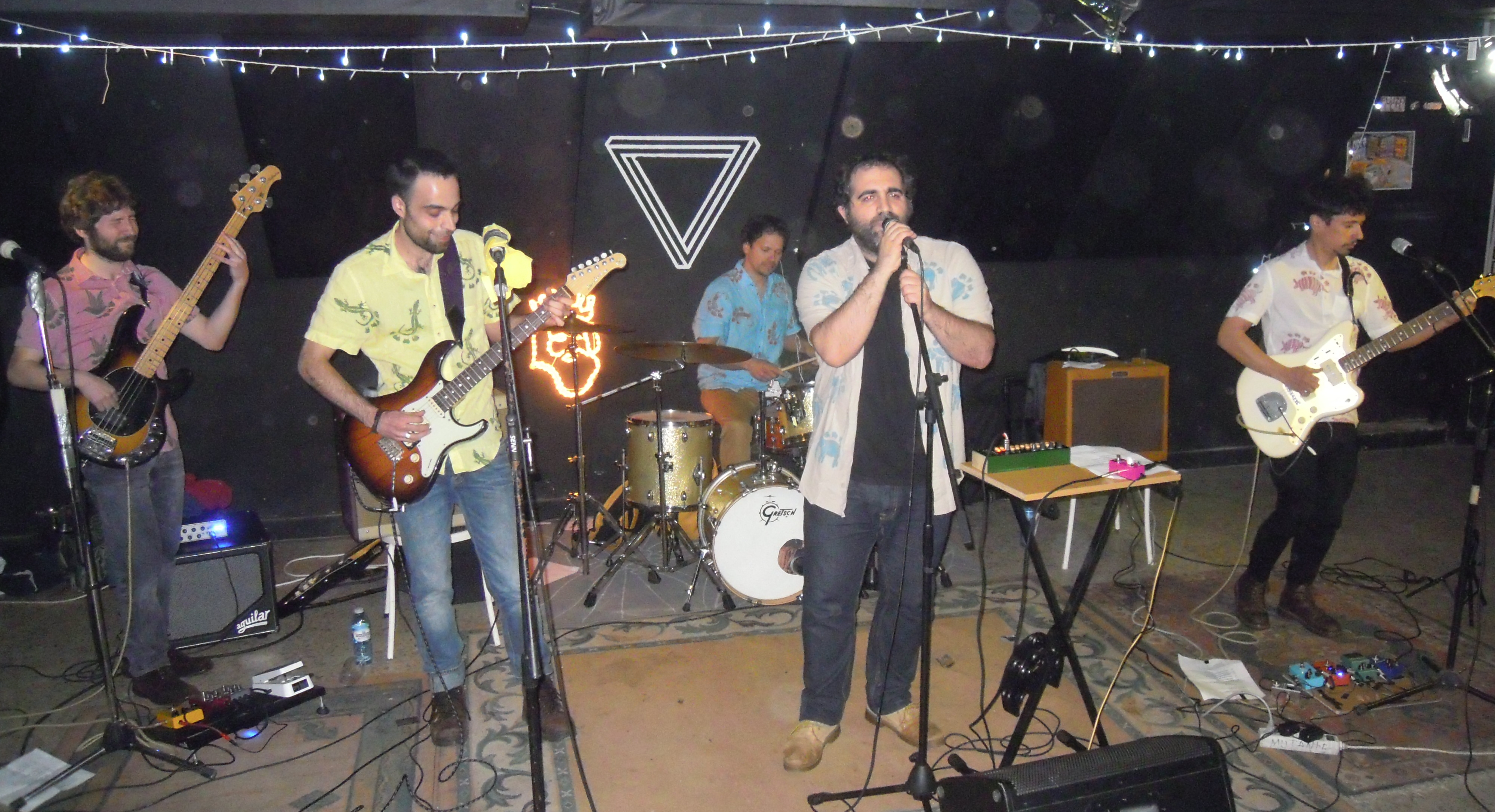 Ataque Escampe en concerto no Liceo Mutante